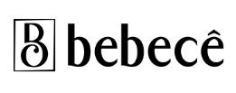 Logotipo Bebecê 2019